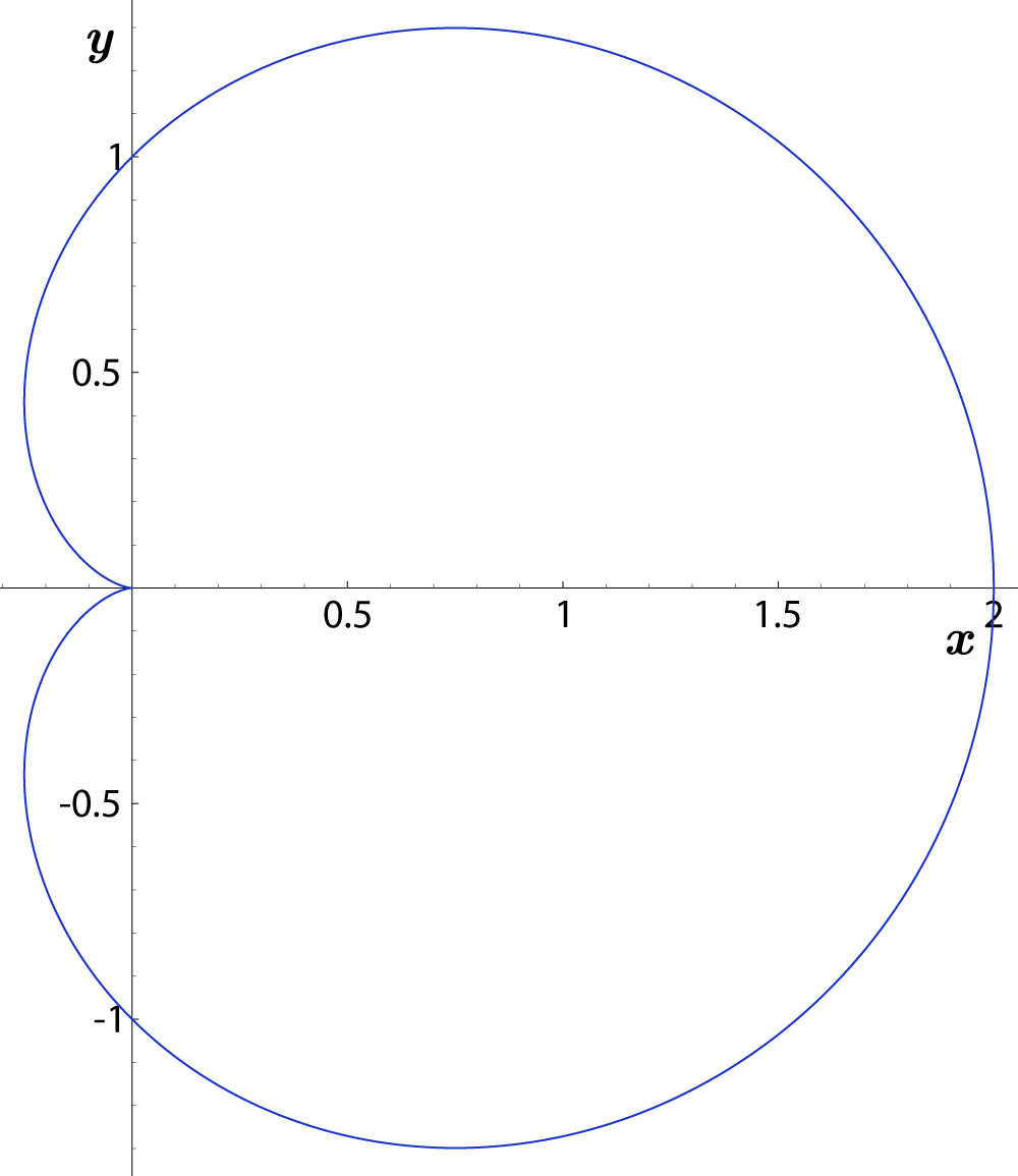 Cardioid: r = a(1 + cosθ)